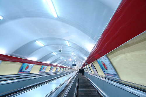 Merto Station TAVISUPLEBIS MOEDANI in Tbilisi, Georgia